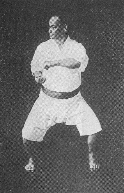 ナイファンチを演じる本部朝基(Naifanchi by Motobu Choki, 1870 - 1944)